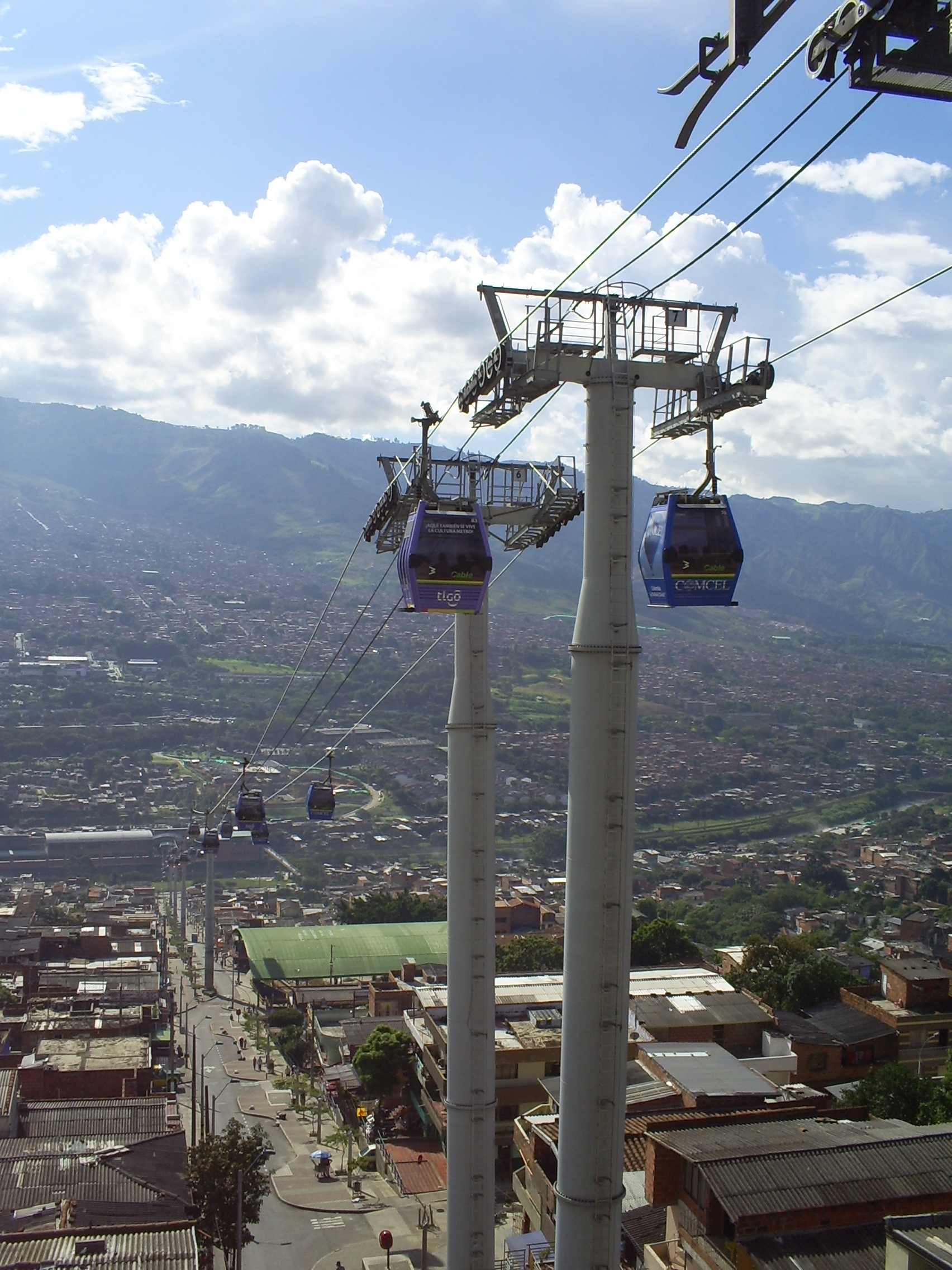 Metro de Medellín, Línea K, Medellín, Colombia